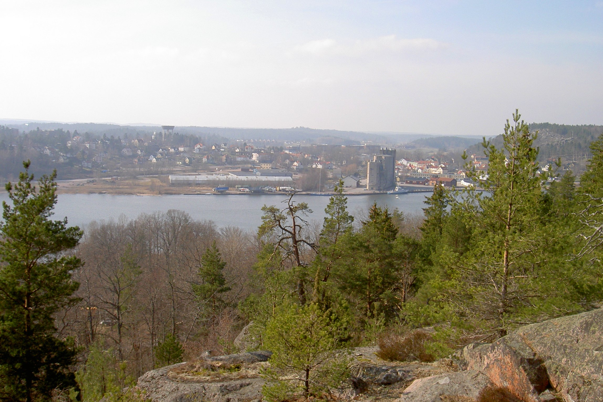 Utsikt över Gamleby, Sverige.